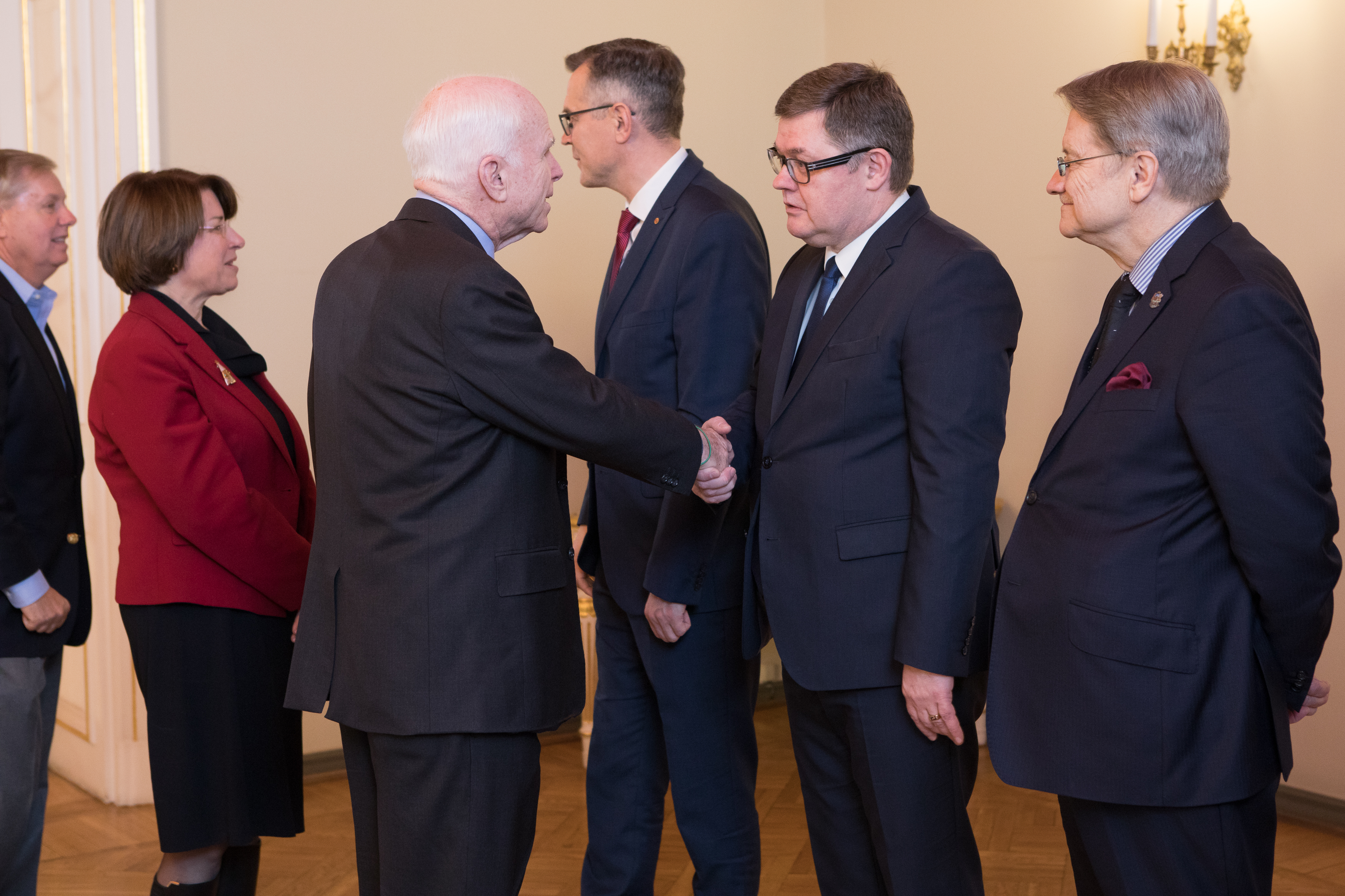 2016.gada 28.decembris. Saeimas priekšsēdētāja Ināra Mūrniece tiekas ar Amerikas Savienoto Valstu Kongresa senatoriem Džonu Makeinu (John McCain), Lindsiju Greiemu (Lindsey Graham) un Eimiju Klobučāru (Amy Klobuchar). Foto: Ernests Dinka, Saeimas Administrācija Izmantošanas noteikumi: saeima.lv/lv/autortiesibas